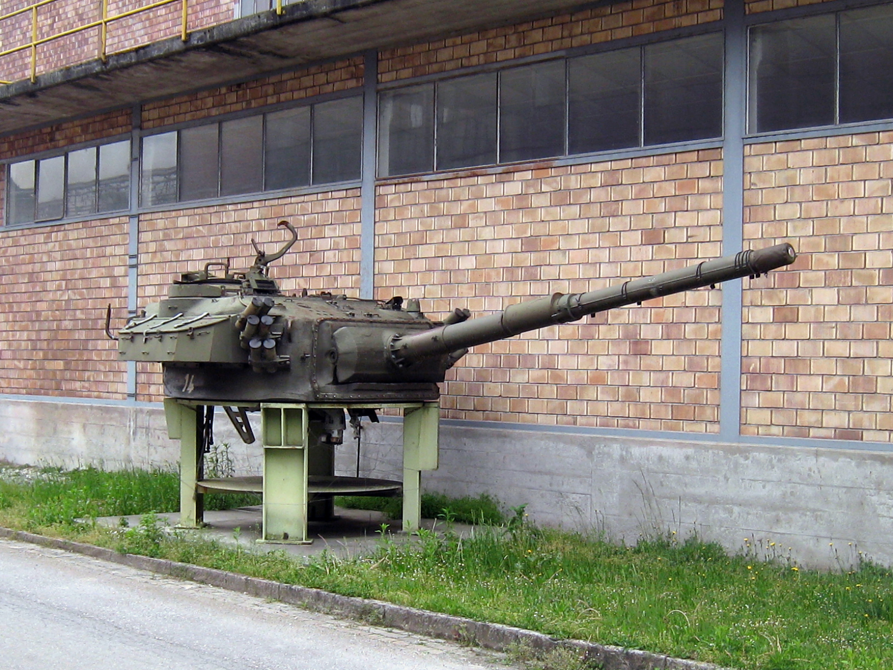 Bunker Centurion-Panzer beim Militärmuseum Full